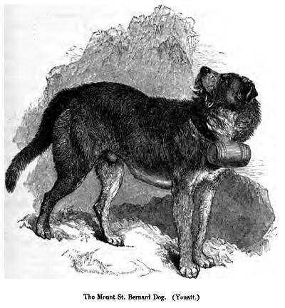 Mount St. Bernard Dog